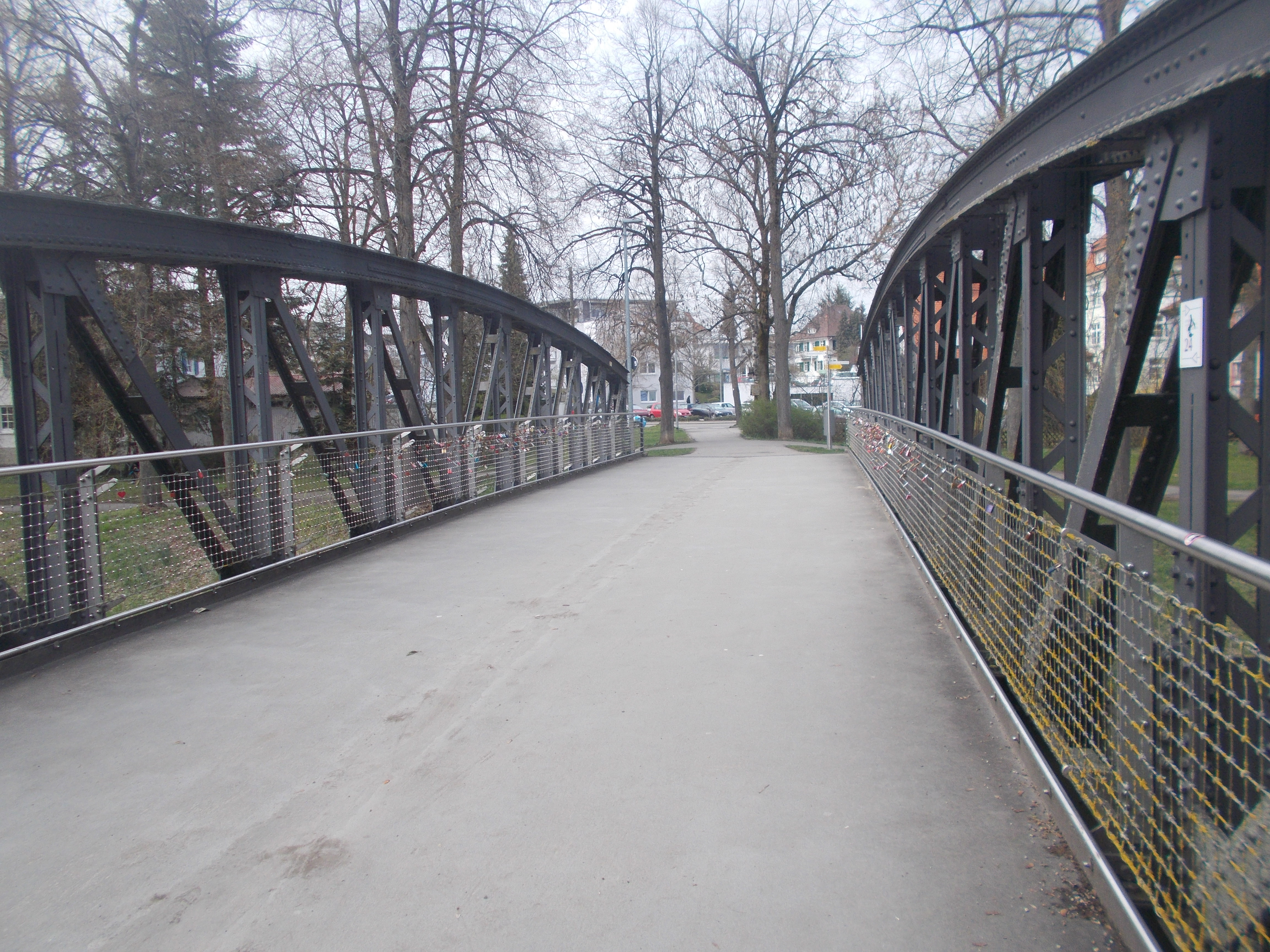 Schellenbergbrücke in Balingen mit Liebesschlössern